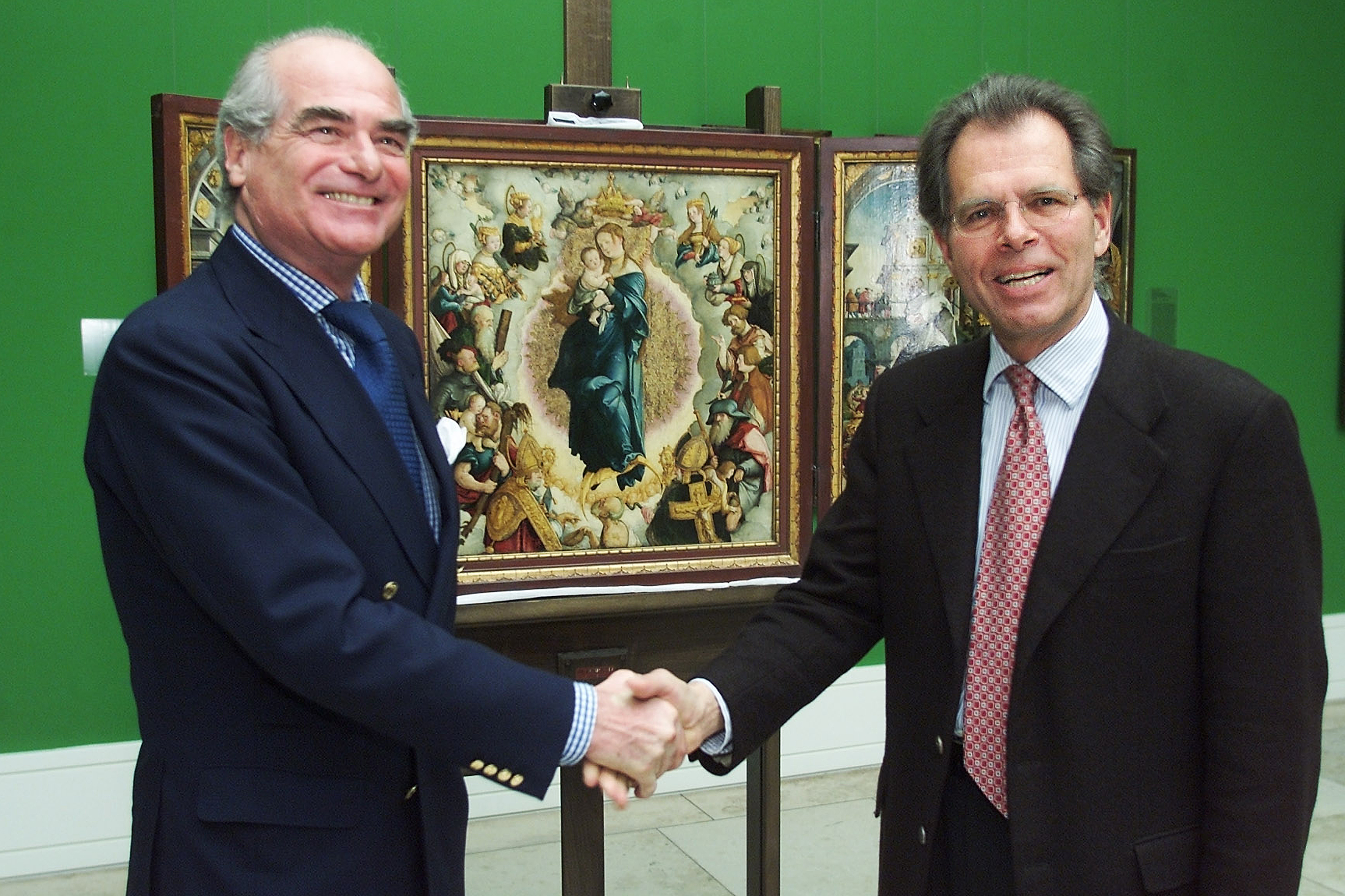 Christian von Holst und Heinrich Fürst zu Fürstenberg in der Staatsgalerie Stuttgart vor dem Wildensteiner Altar des Meisters von Meßkirch aus den Fürstlich Fürstenbergischen Sammlungen, Donaueschingen